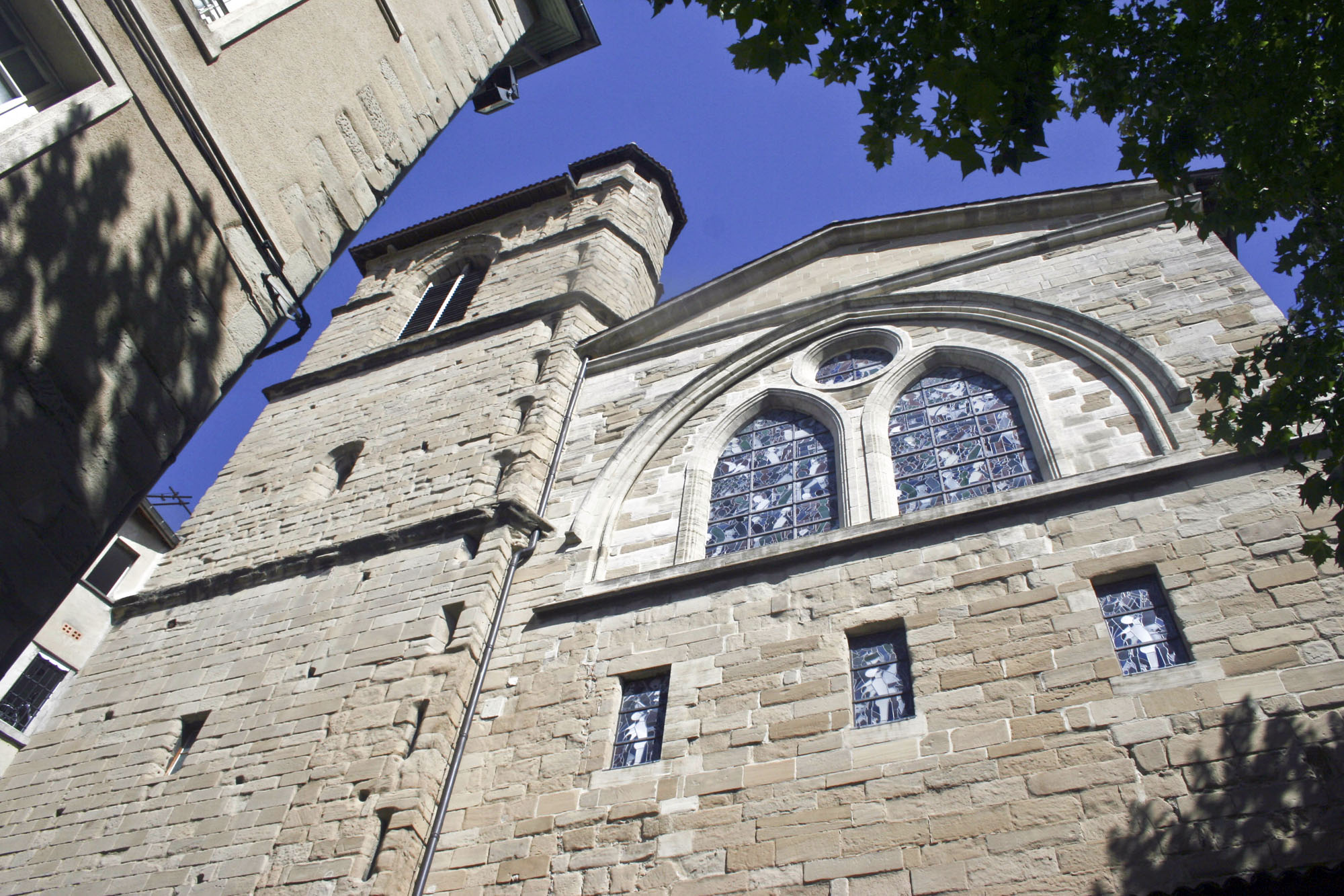 Collégiale Saint-Barnard de Romans-sur-Isère, Drôme, France, façade et clocher.